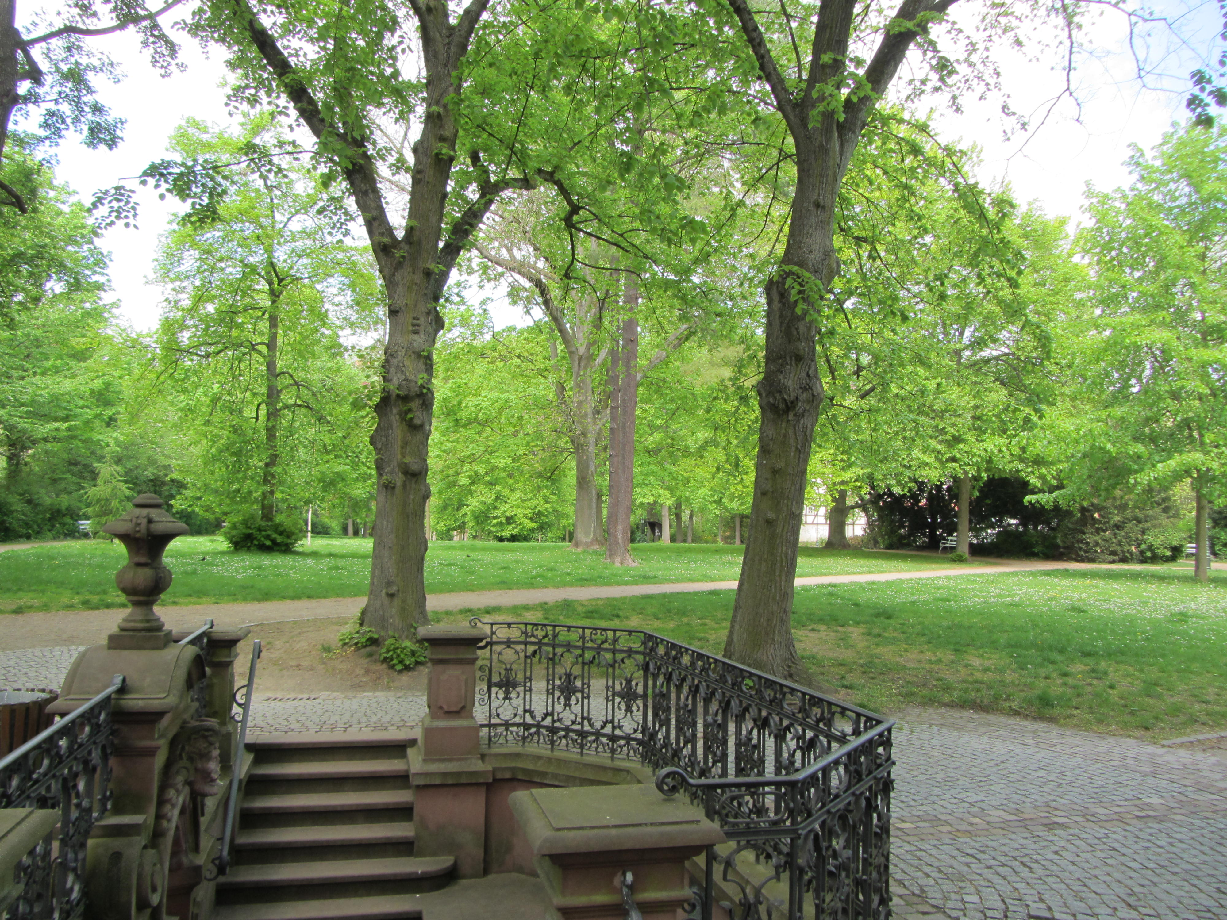 Der Wilhemspark in Bad Soden Taunus